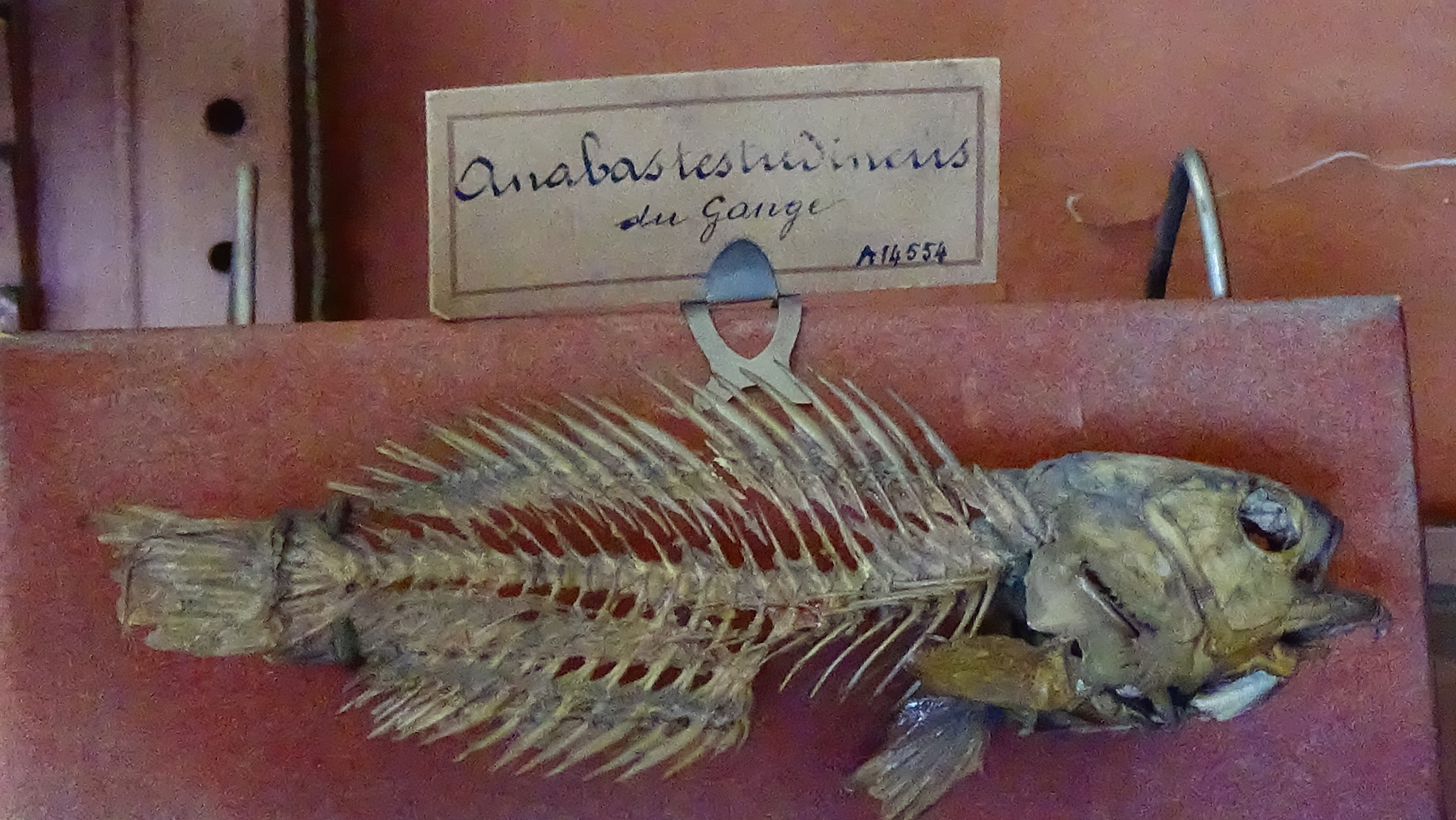 Anabas testudineus - squeletteMNHN